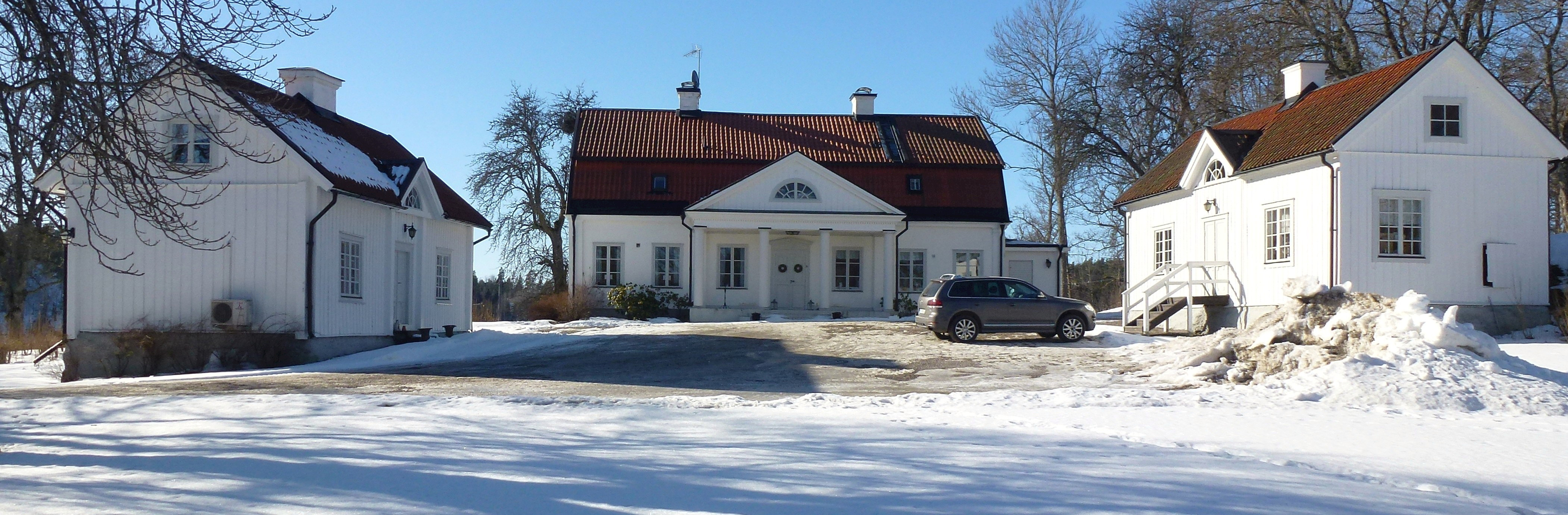 Ladviks gård och dess ekonomibyggnader i mars 2013 (RAÄ-nummer Salem 202:1)